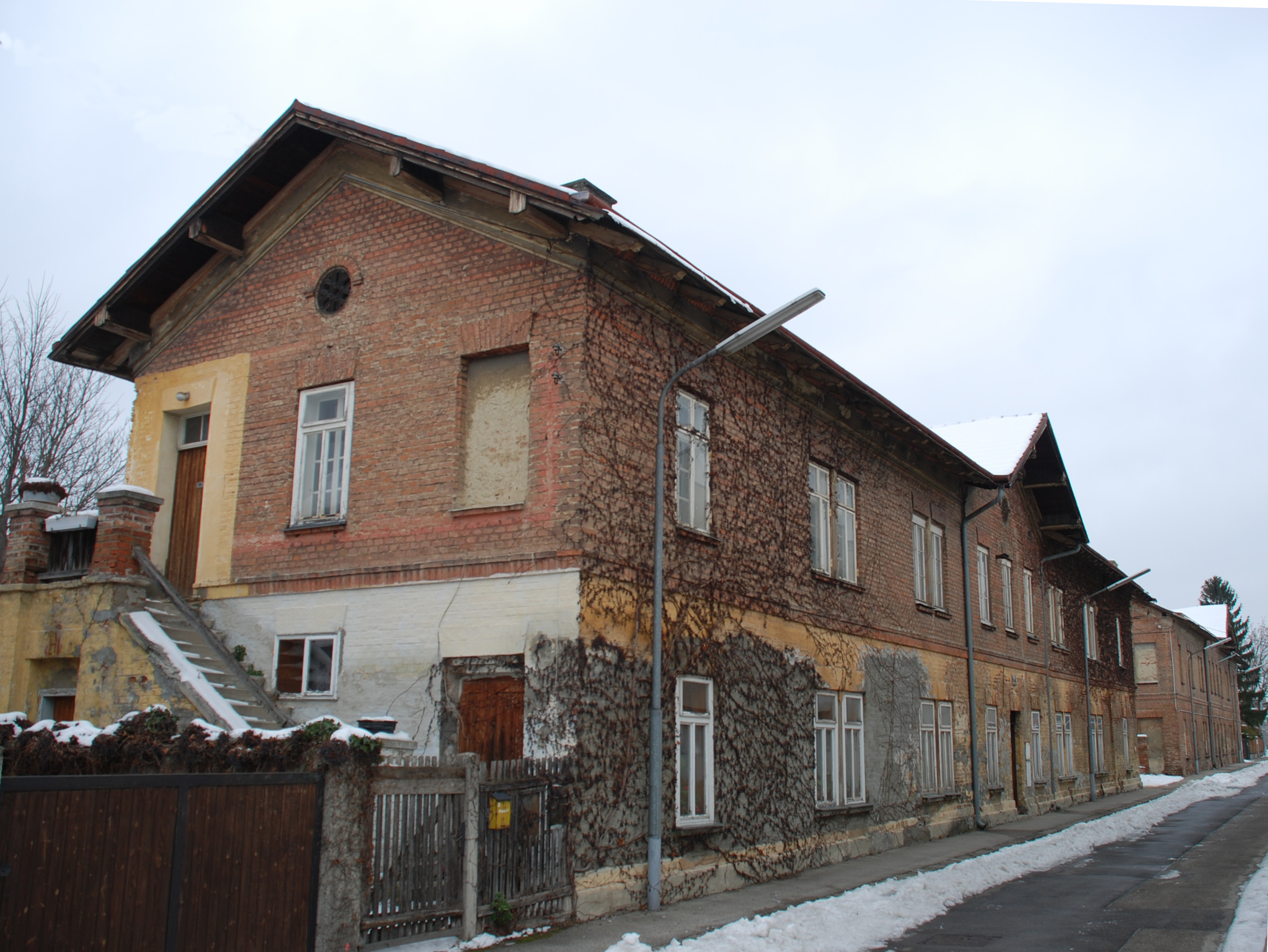 Arbeiterhäuser der Sarg-Werke in Wien Liesing, Alois-Dachs-Gasse